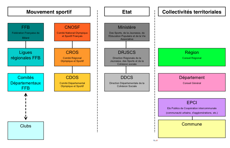 Place de la FFB dans l'organisation du sport-billard en France.